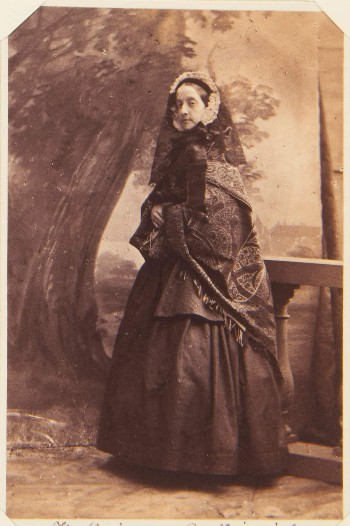 Franziska Caroline von Portugal aka Francisca de Bragança aka Françoise de Joinville (1824-1898)